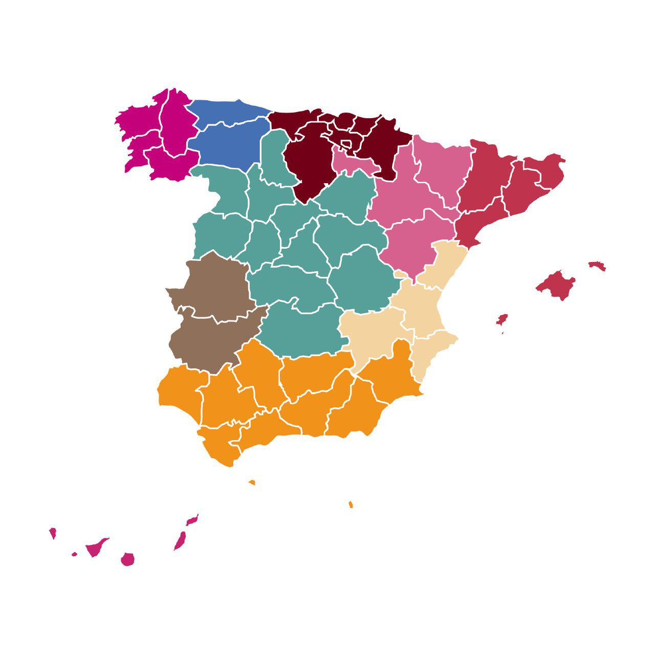 Mapa de la distribución de Confederaciones Regionales de la CNT en 2019